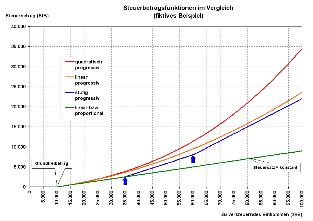 Vergleich der Steuerbetragsfunktionen verschiedener Progressionsmodelle (Die Beispiele verdeutlichen nur das Prinzip und sind rein fiktiv)